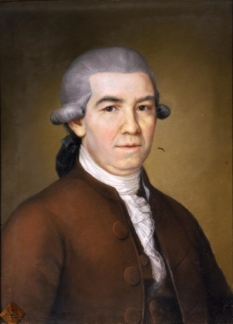 Retrato del grabador e ilustrado español Manuel Salvador Carmona (1734-1820).